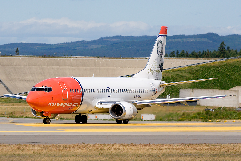 Norwegian Boeing B737-300 LN-KKJ på Oslo lufthavn, Gardermoen.